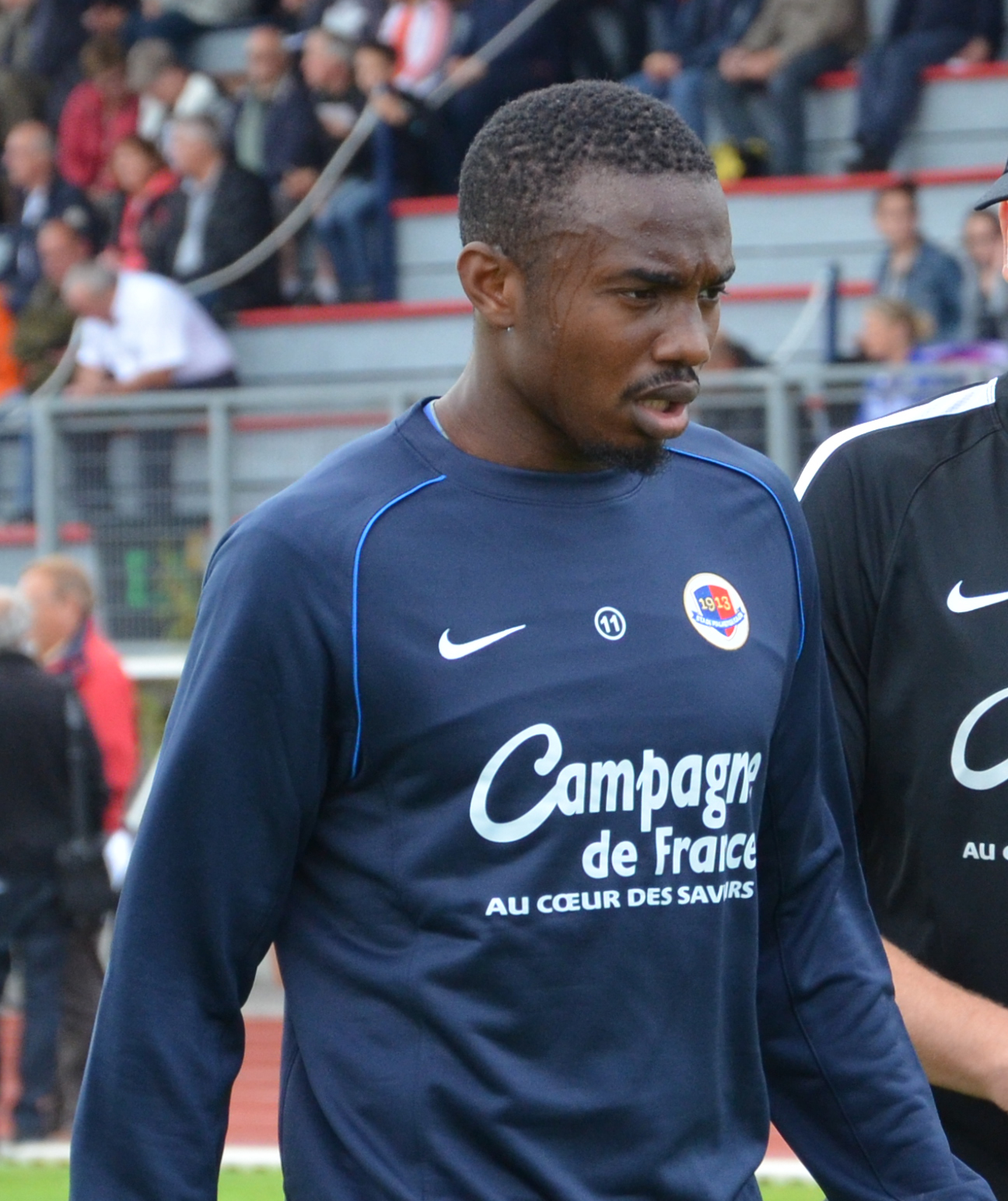 Photographie prise à l'occasion de la rencontre amicale opposant le Stade Malherbe de Caen au Stade rennais, le 9 juillet 2014 au stade Pierre-Comte de Vire. Ici, Bengali-Fodé Koïta.